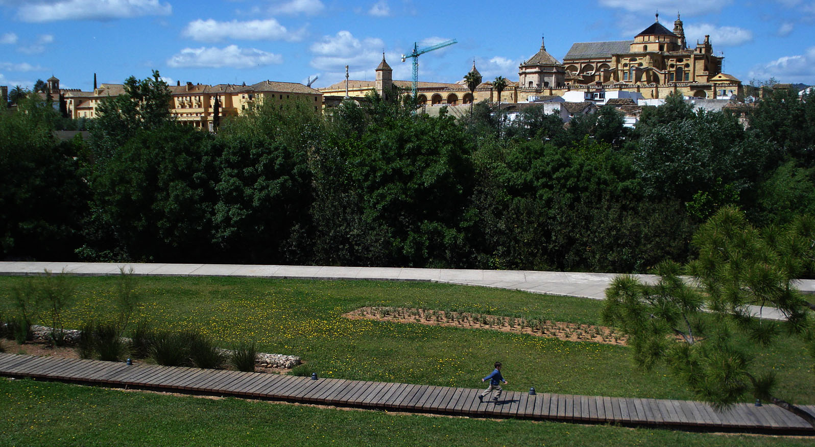 Parque de Miraflores, Córdoba (España).